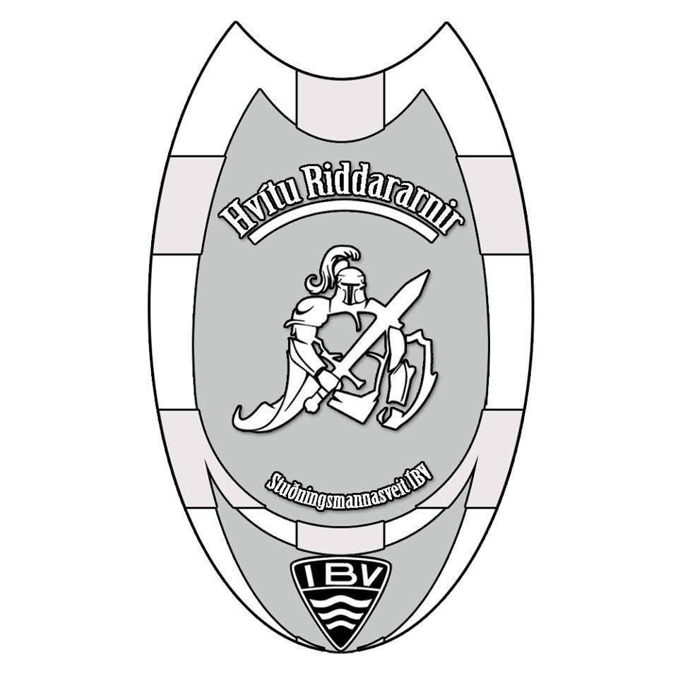 Merki Hvítu Riddarana